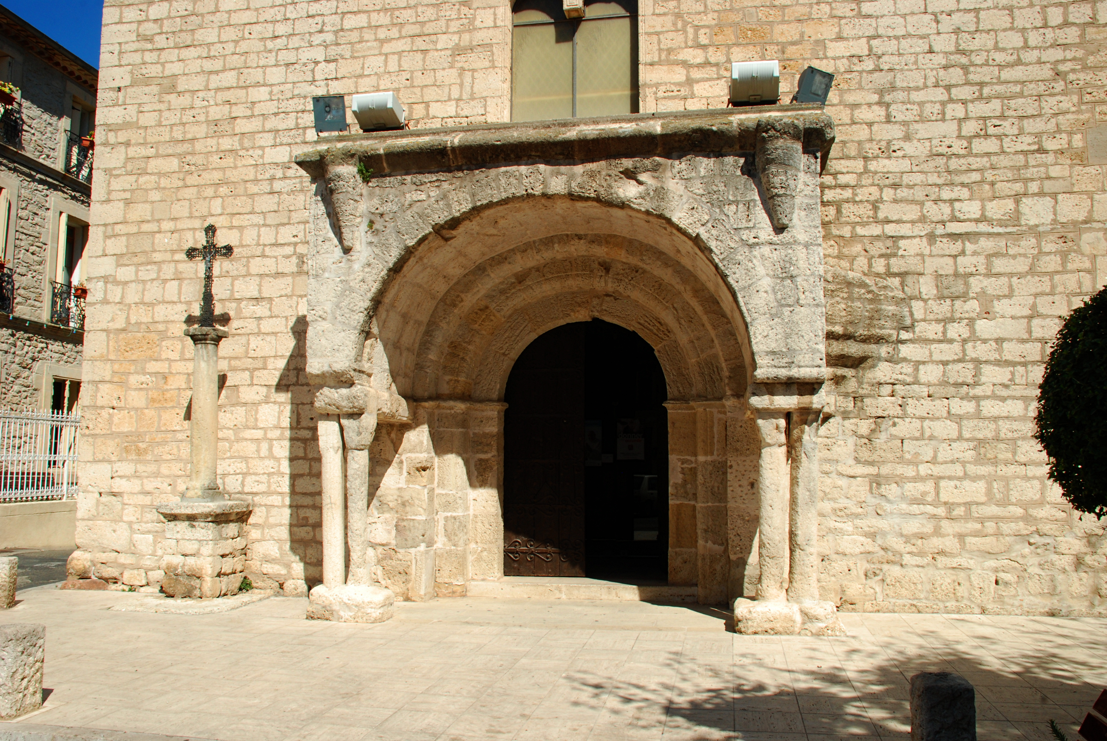 France - Languedoc - Hérault - Magalas - Église Saint-Laurent .